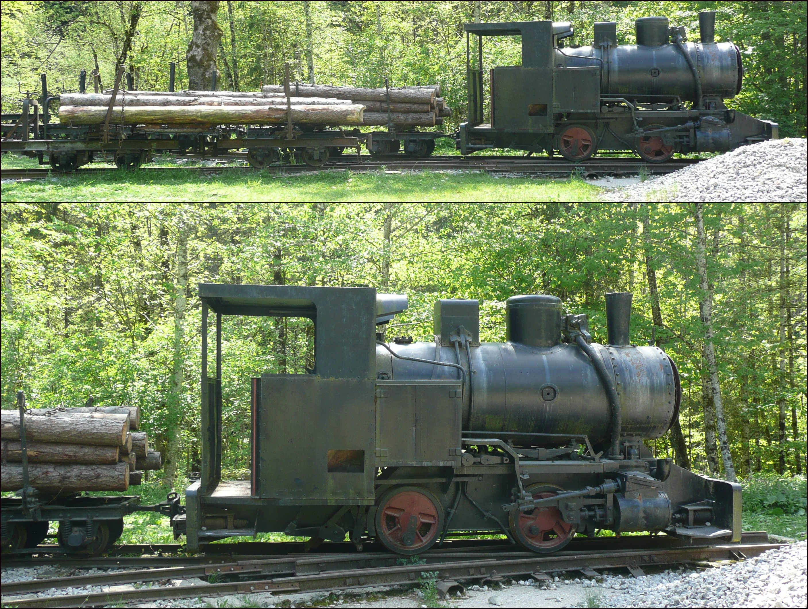 Waldbahn Reichraming in Brunnbach